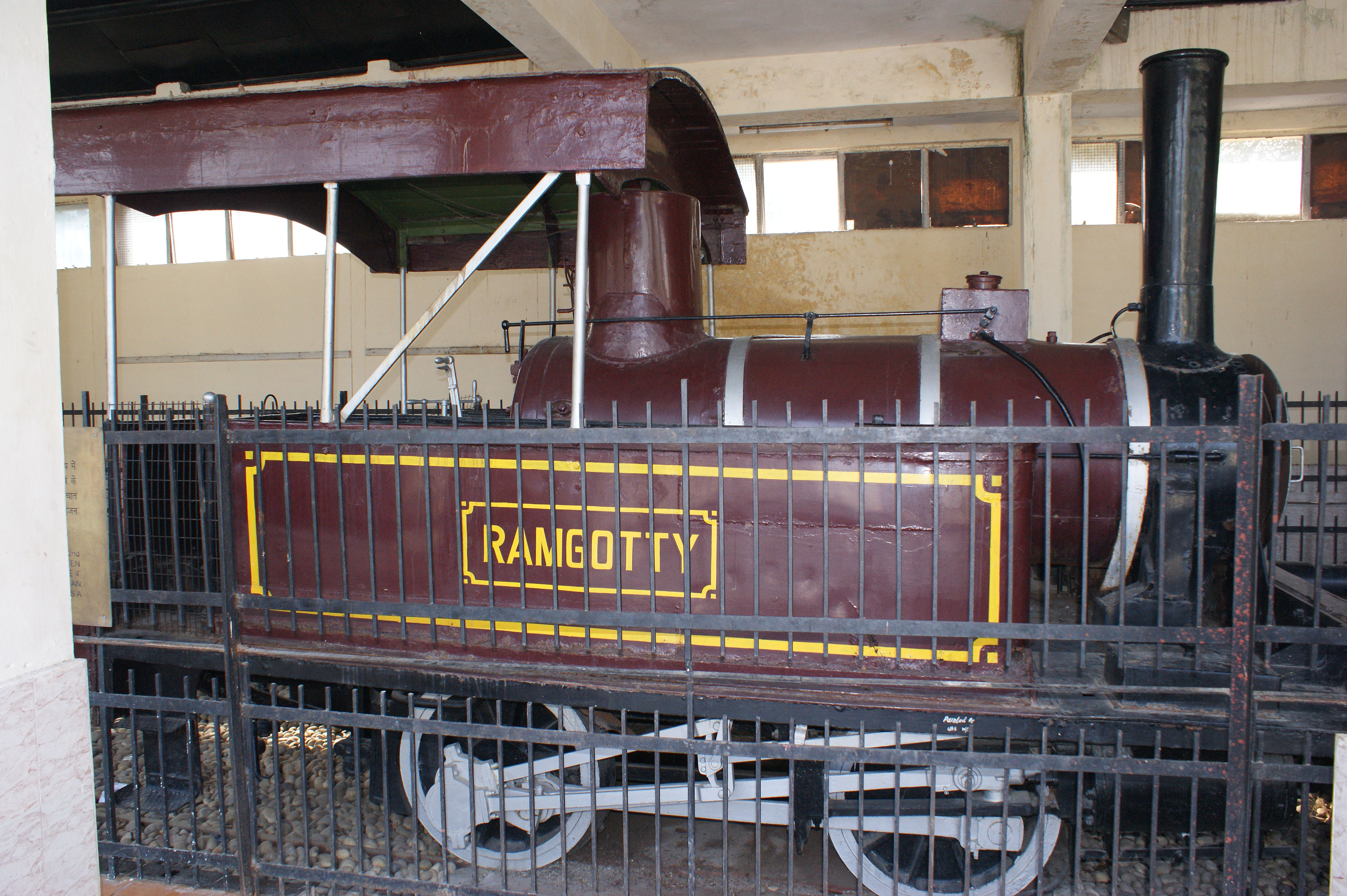 Musée National du Rail à New Delhi, locomotive à vapeur préservée : Ramgotty, construite par Anjubault à Paris. L'une des deux locomotives encore existante de ce constructeur à l'origine de Corpet-Louvet. Elle est présentée comme la deuxième plus ancienne locomotive préservée des chemins de fer indiens.